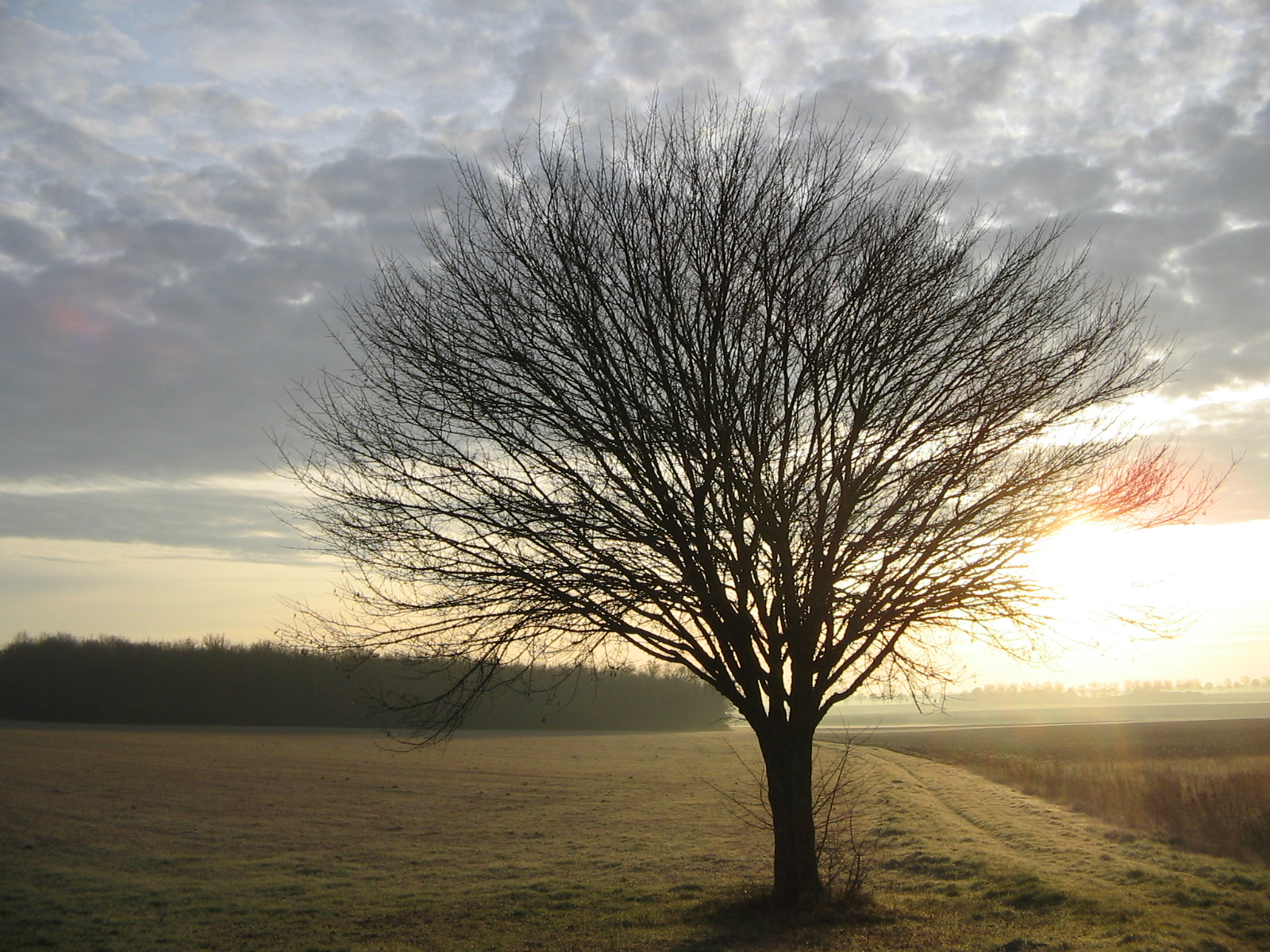 Paysage à Varennes (86)